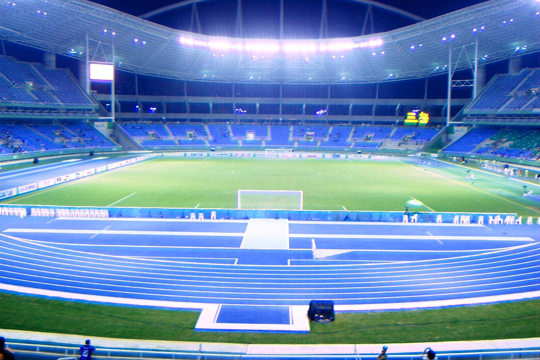 Vista de trás do gol (Setor Norte) do estádio do Engenhão nos Jogos Pan-americanos de 2007.